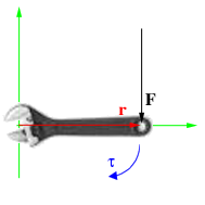 skapad (av rogper)